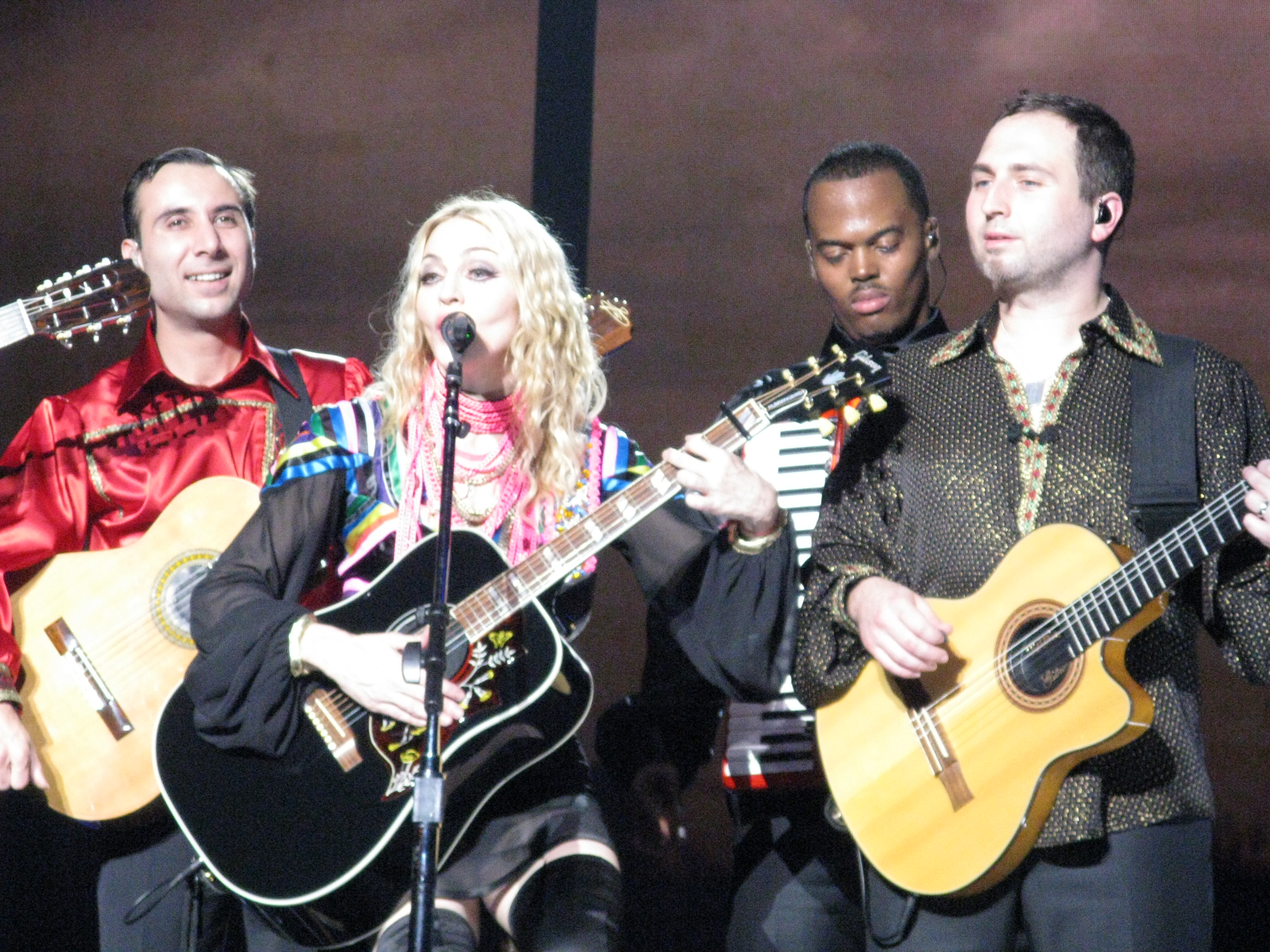 Madonna at Madison Square Garden_6609.JPG